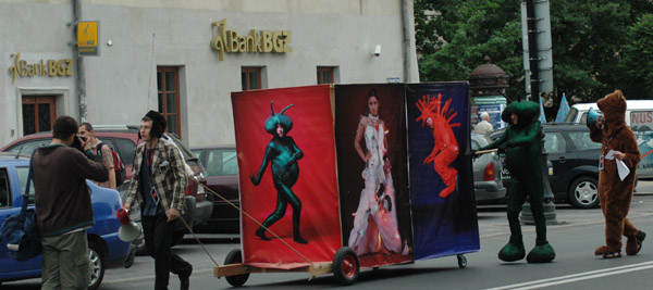 Jeżdżąca wystawa - Noc Kultury 2007